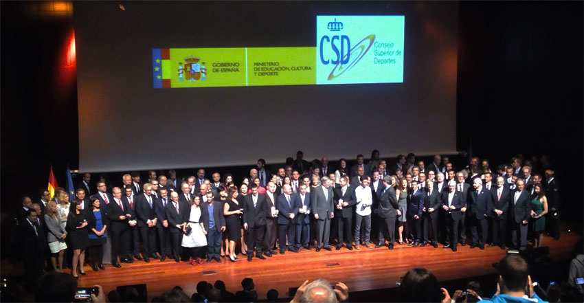 Los deportistas y directivos premiados en la entrega de las Medallas y Placas de la Real Orden del Mérito Deportivo el 14 de octubre de 2015 en el Museo Nacional Centro de Arte Reina Sofía de Madrid.